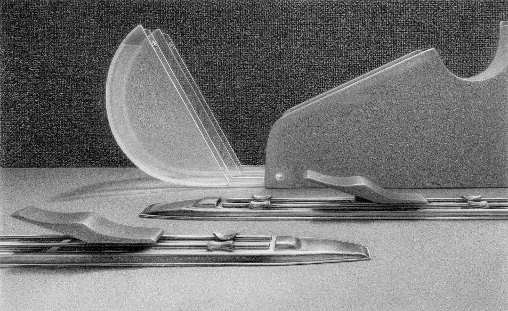 Astrid Brandt, Mezzaluna, 2011, Bleistiftzeichnung, Blatt IXX aus der Folge "Büropartikel", 13 x 21 cm